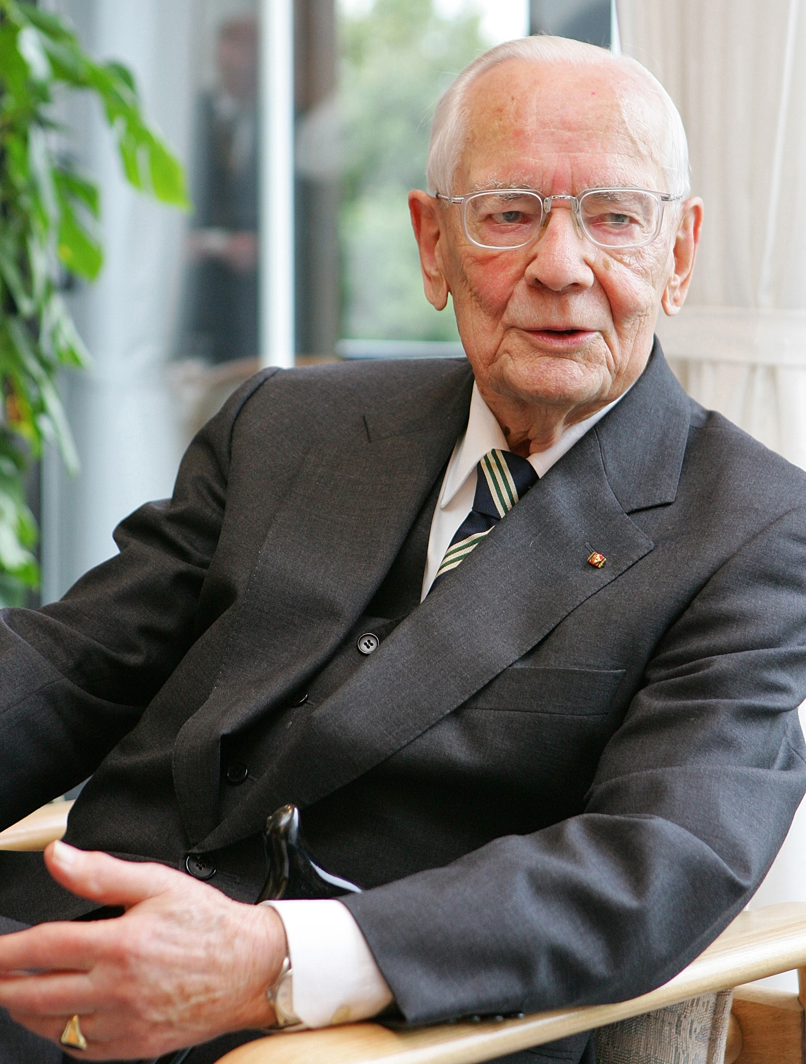 General a.D. Ulrich de Maizière, Generalinspekteur der Bundeswehr ( 25.08.1966 - 31.03.1972 ). Das Bild entstand bei seinem Besuch im Bundesministerium der Verteidigung auf der Bonner Hardthöhe.© Bundeswehr/Sandra Elbern